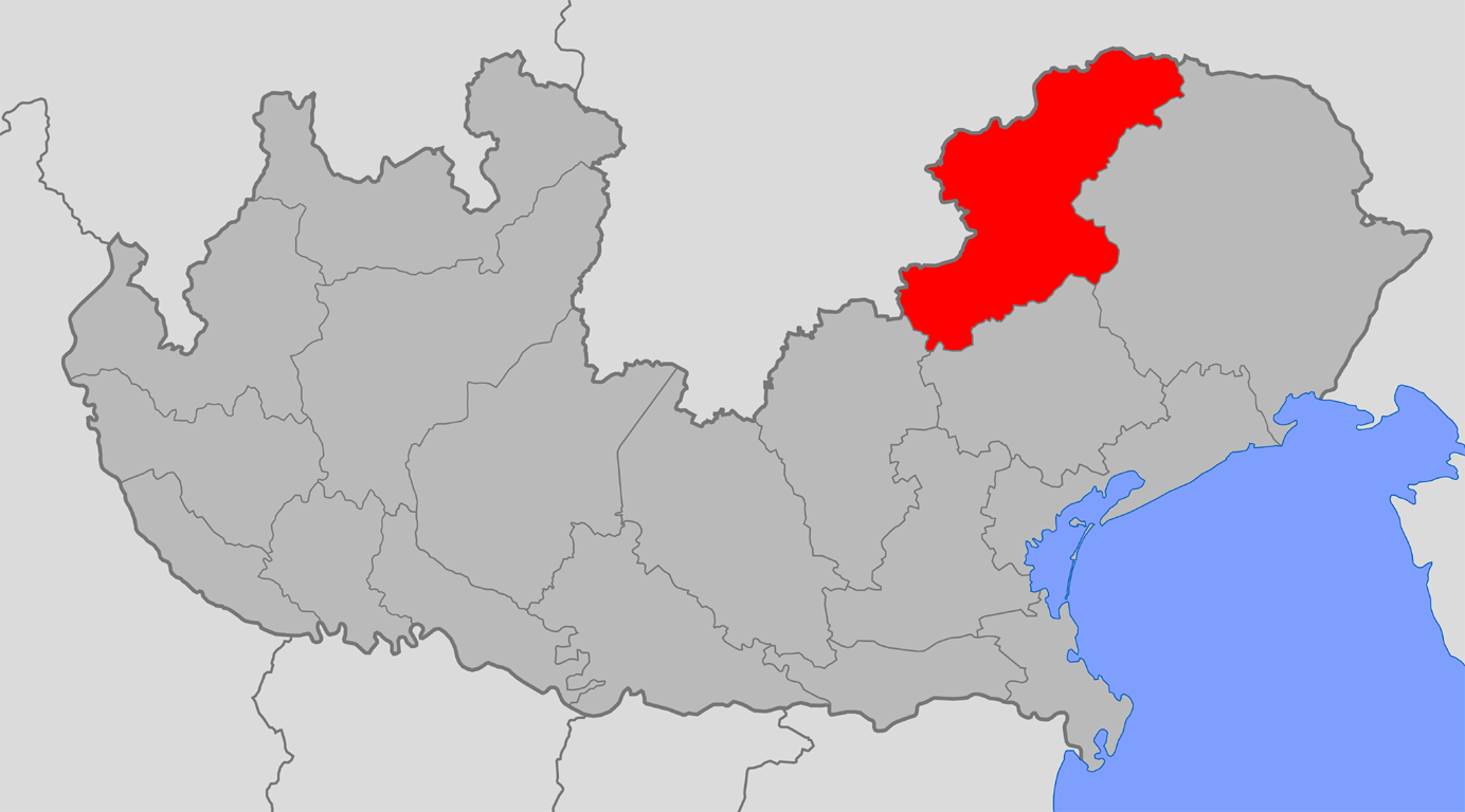 La provincia di Belluno nel Regno Lombardo-Veneto (1816-1859)